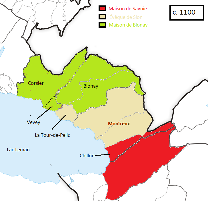 Les seigneurs de la Riviera dans la 1ère moitié du XIIè siècle.